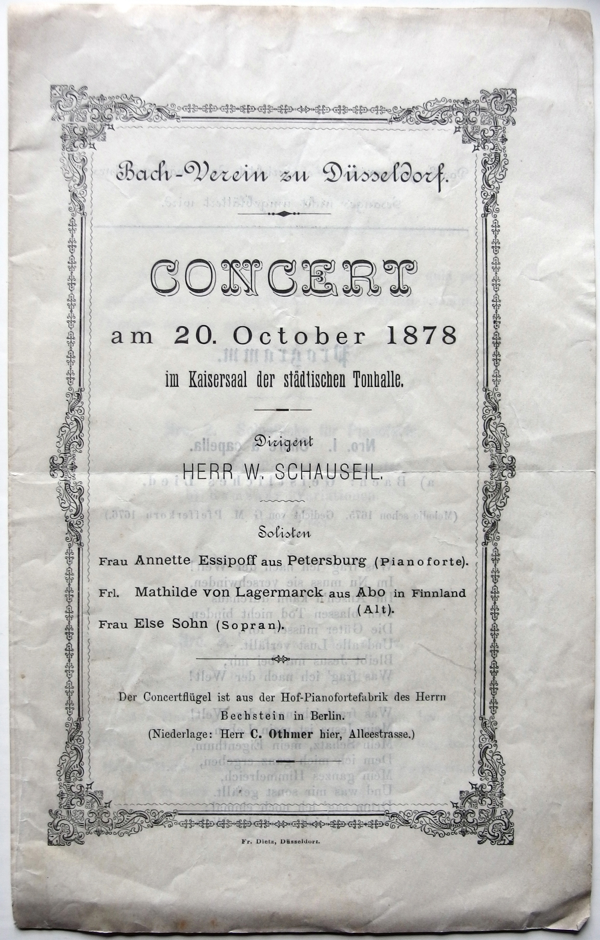 Bach-Verein zu Düsseldorf, Programm: Concert am 20. Oktober 1878, im Kaisersaal der städtischen Tonhalle, Dirigent: W. Schauseil, Solisten: Annette Essipoff aus Petersburg (Pianoforte), Mathilde von Lagermarck aus in Abo Finnland (Alt), Else Sohn (Sopran)